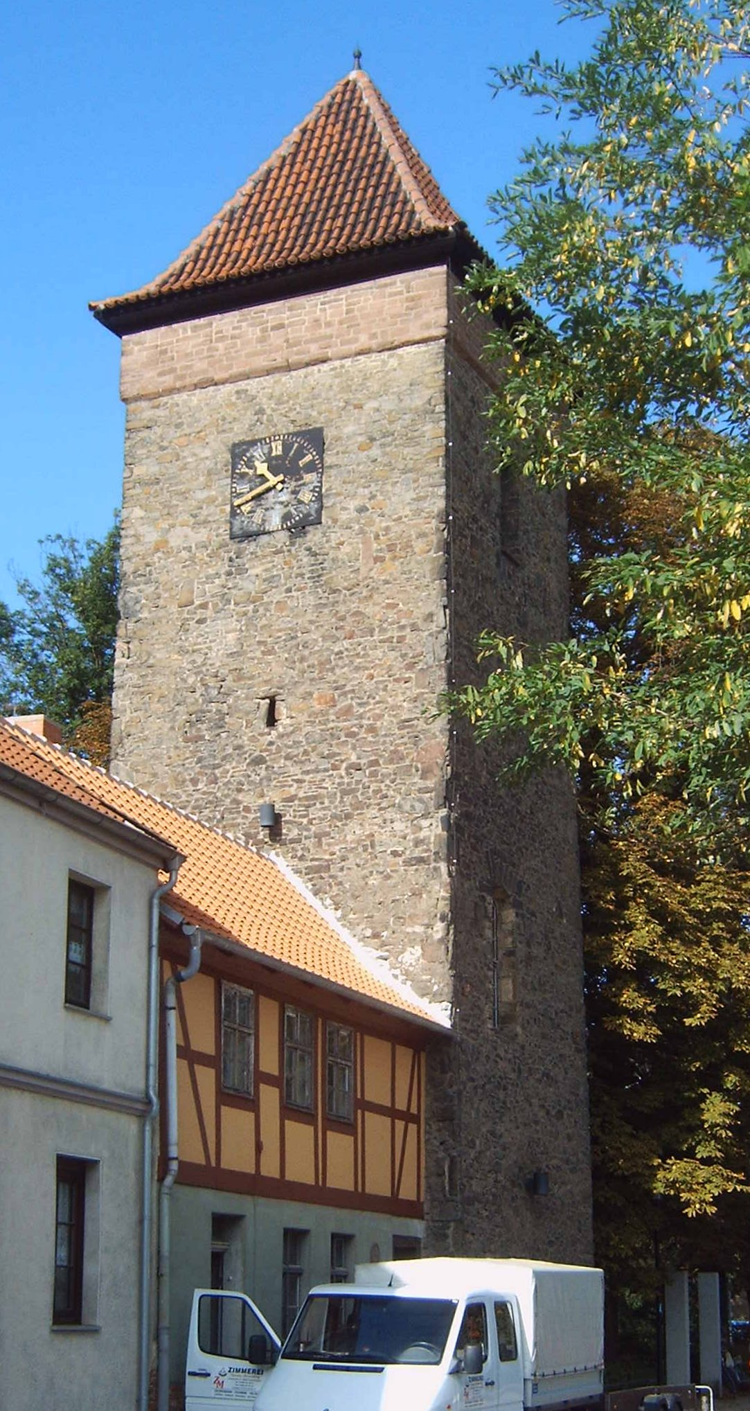 Bülstringer Torturm in Haldensleben, Stadtseite, Sachsen-Anhalt, deutschland